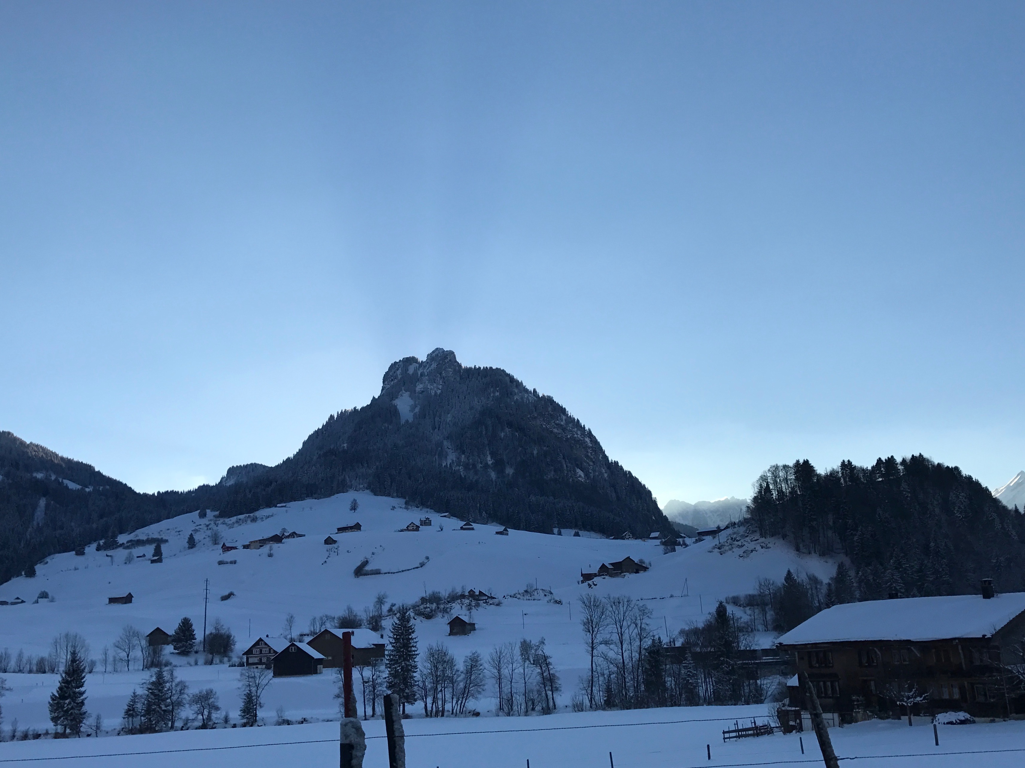 Goggeien